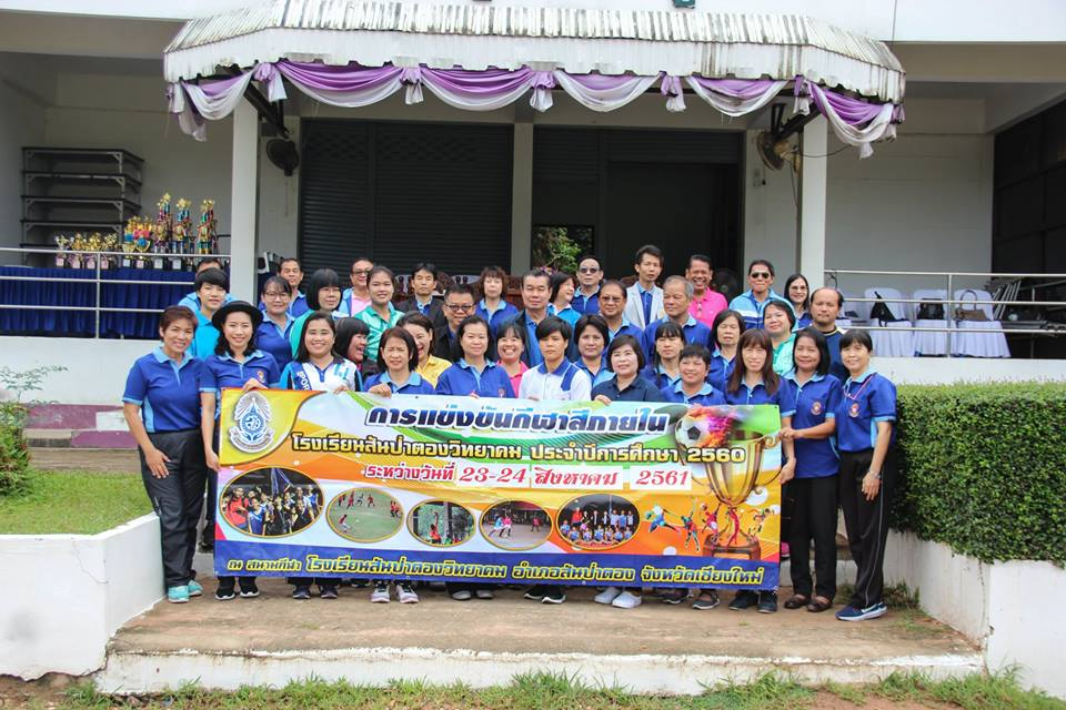 กีฬาสี 61 ส.ว.(2)